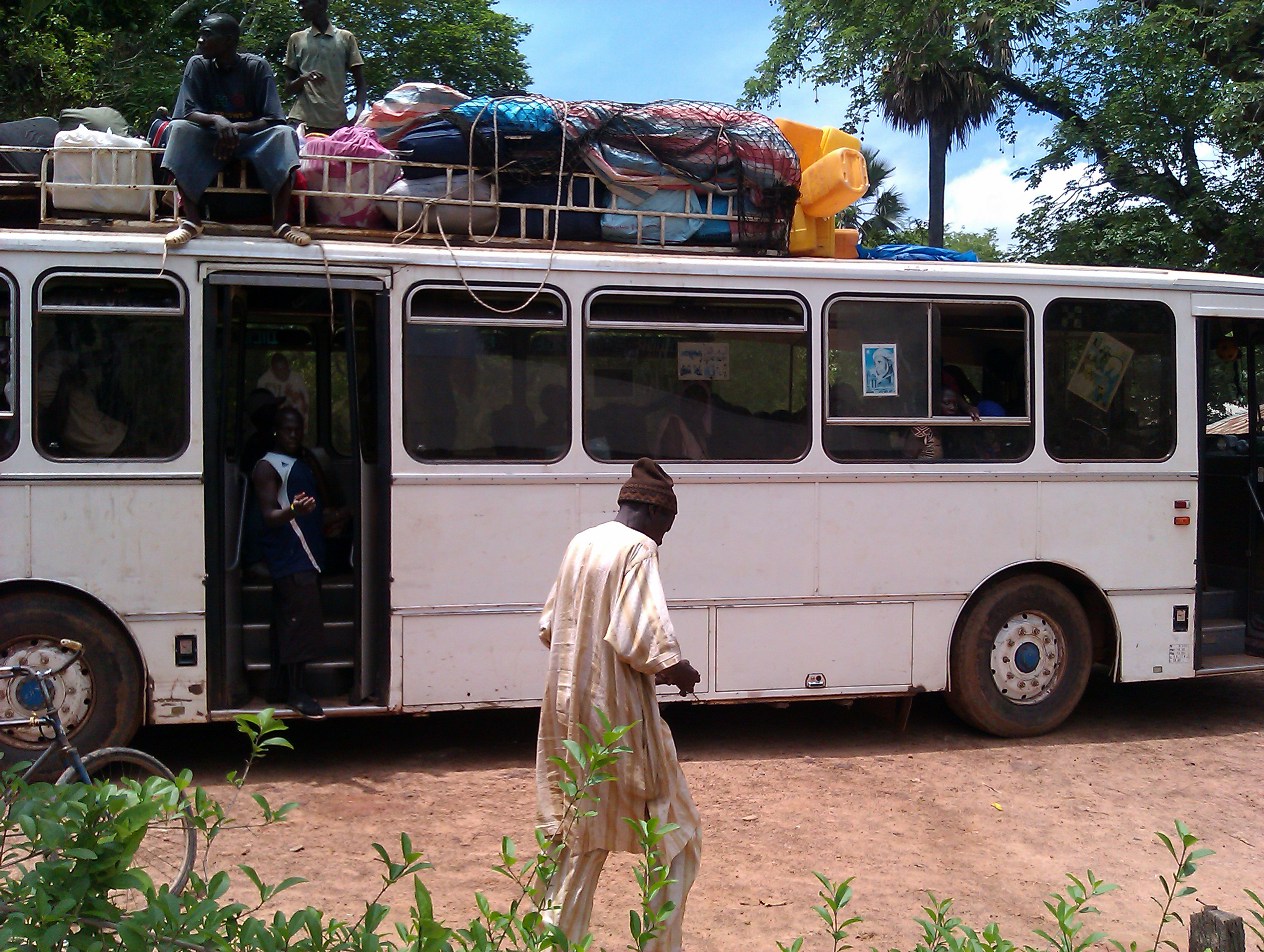 Casamance Bagaya transport public par autocar This is an image with the theme "Africa on the Move or Transport" from: Senegal